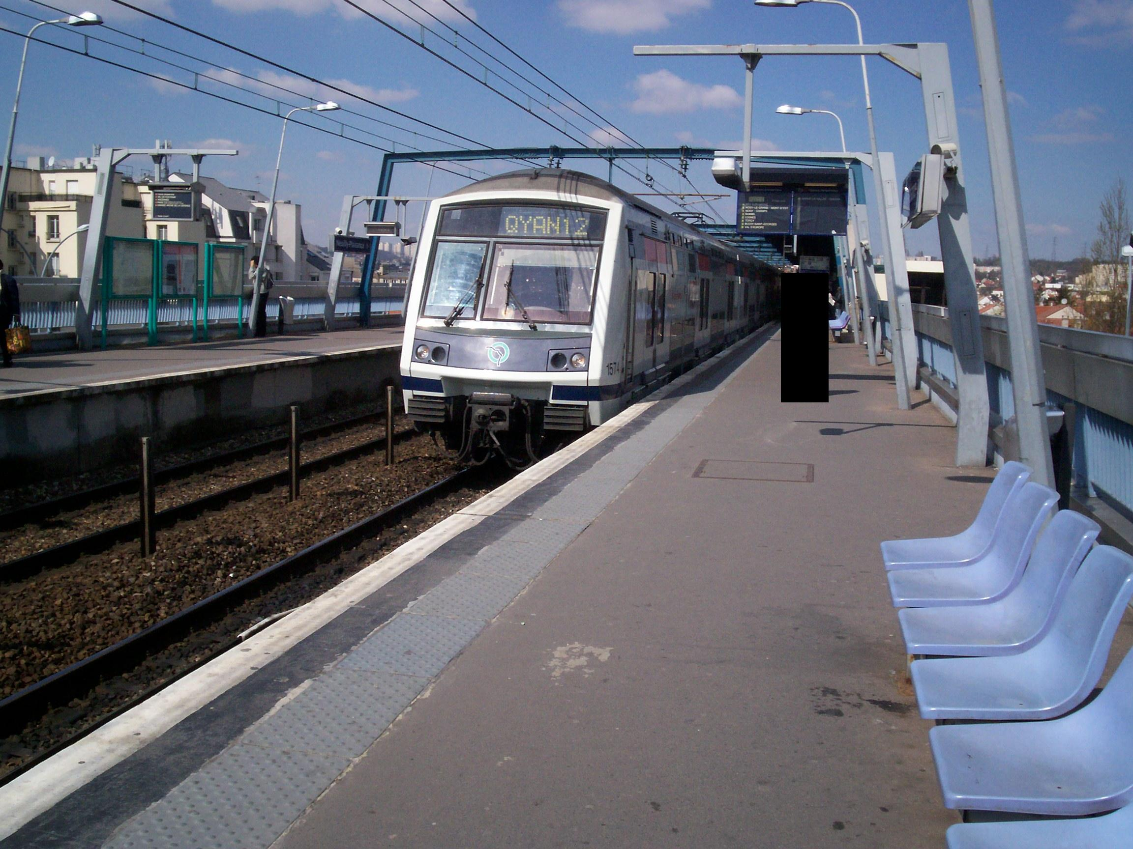 Mi2n à Neuilly-Plaisance